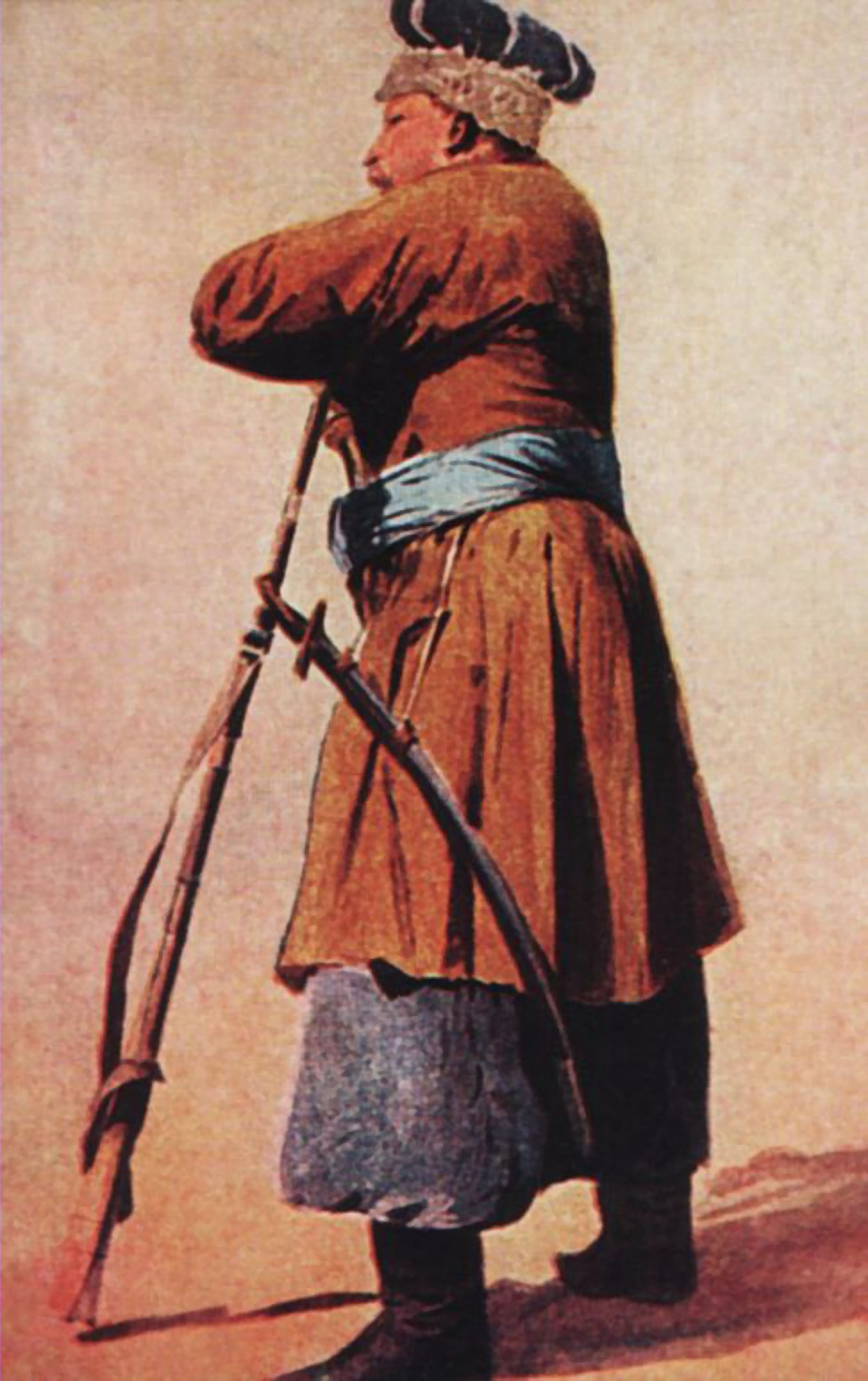 Козак на варті